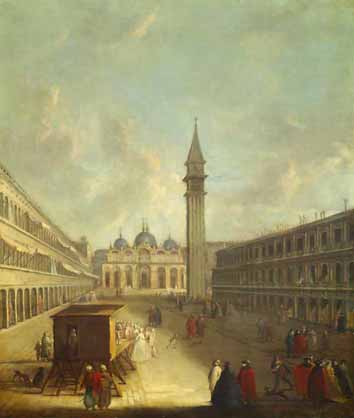 Der Markusplatz in Venedig, 1740, Öl auf Leinwand, 105 x 89 cm, signiert u.r.: H. Keller pinxit. 1740, Theaterwissenschaftliche Sammlung der Universität zu Köln (Schloss Wahn), Inv.-Nr. 5392